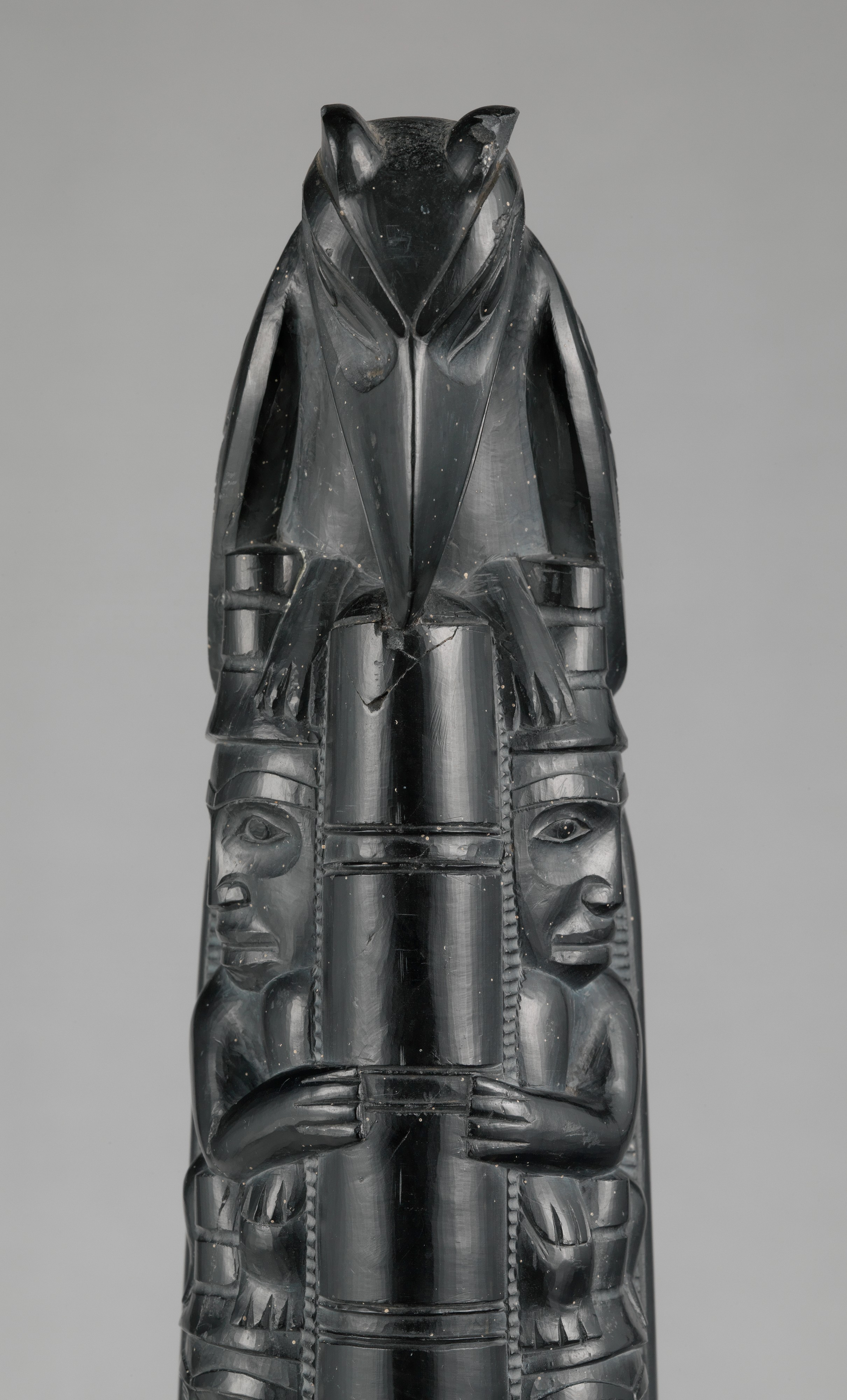 Haida; Totem pole model; Stone-Sculpture